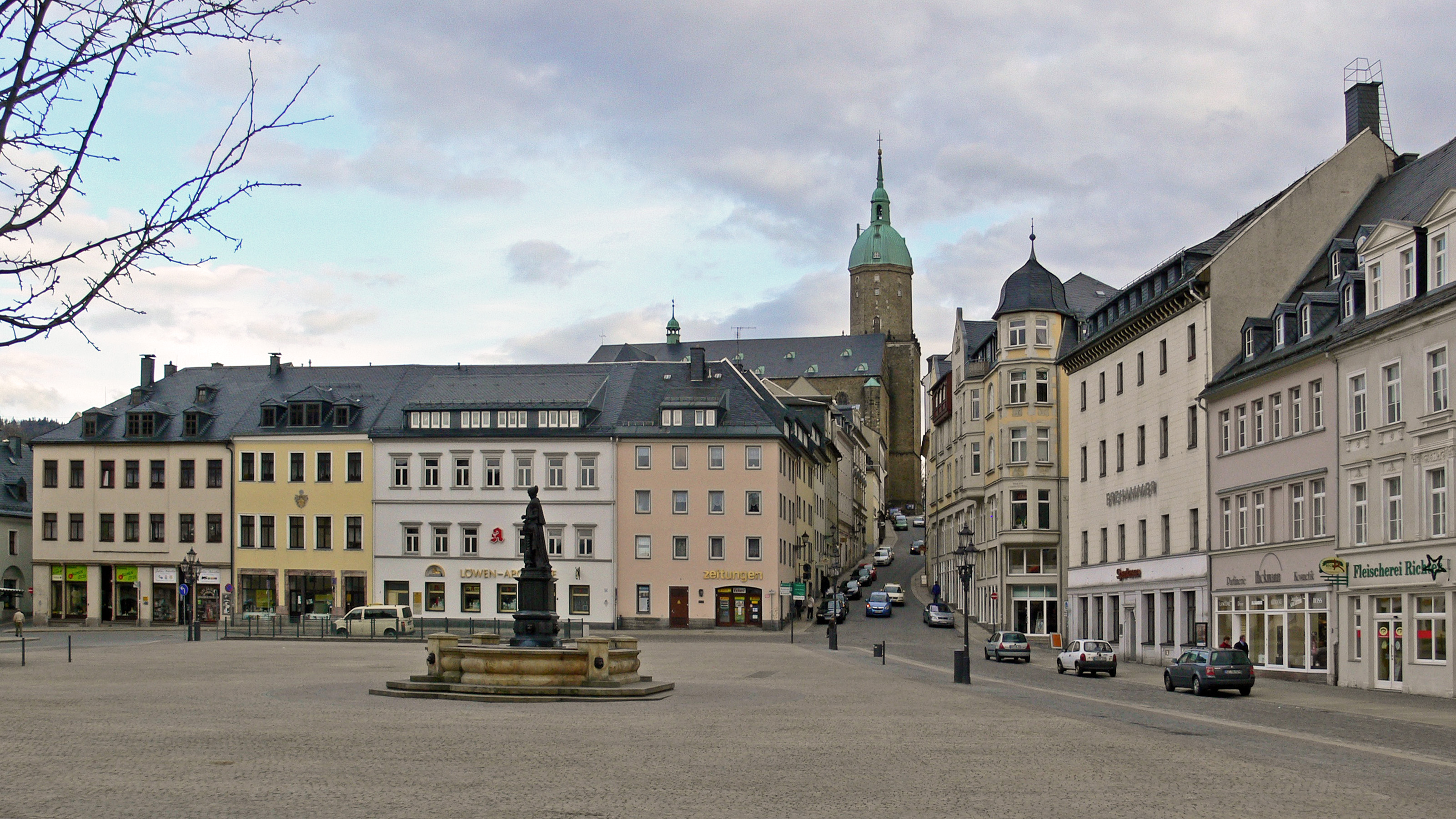 Annaberg-Buchholz, Markt